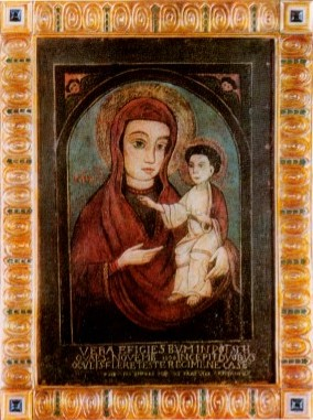 Madonna von Pötsch in Kindsbach